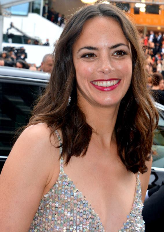 Bérénice Bejo au festival de Cannes